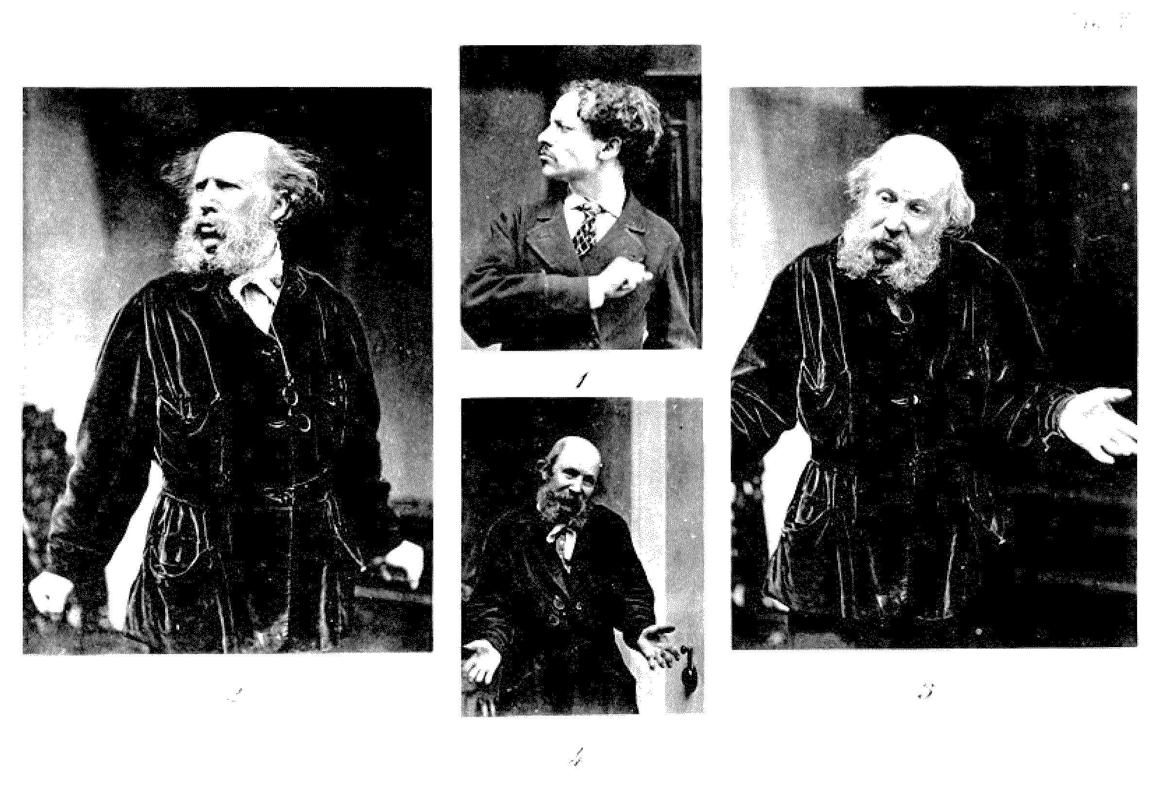 Tab6